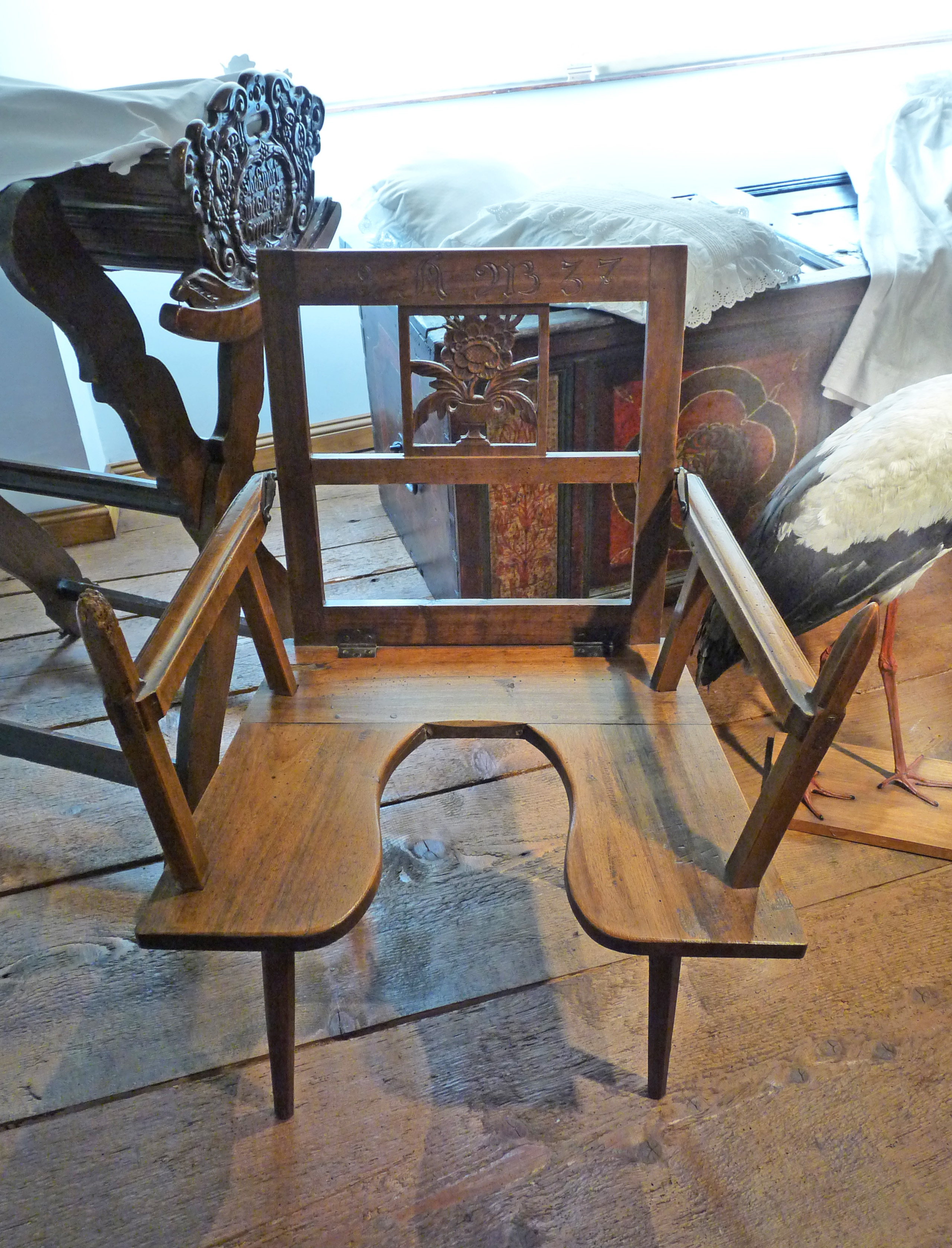 Berceau de baptême date de 1655 et chaise d'accouchement (fabriquée en 1837 pour Anne Willig, sage-femme à Hurtigheim. Bois de fruitier, accoudoirs démontables et dossier repliable), Musée alsacien de Strasbourg.